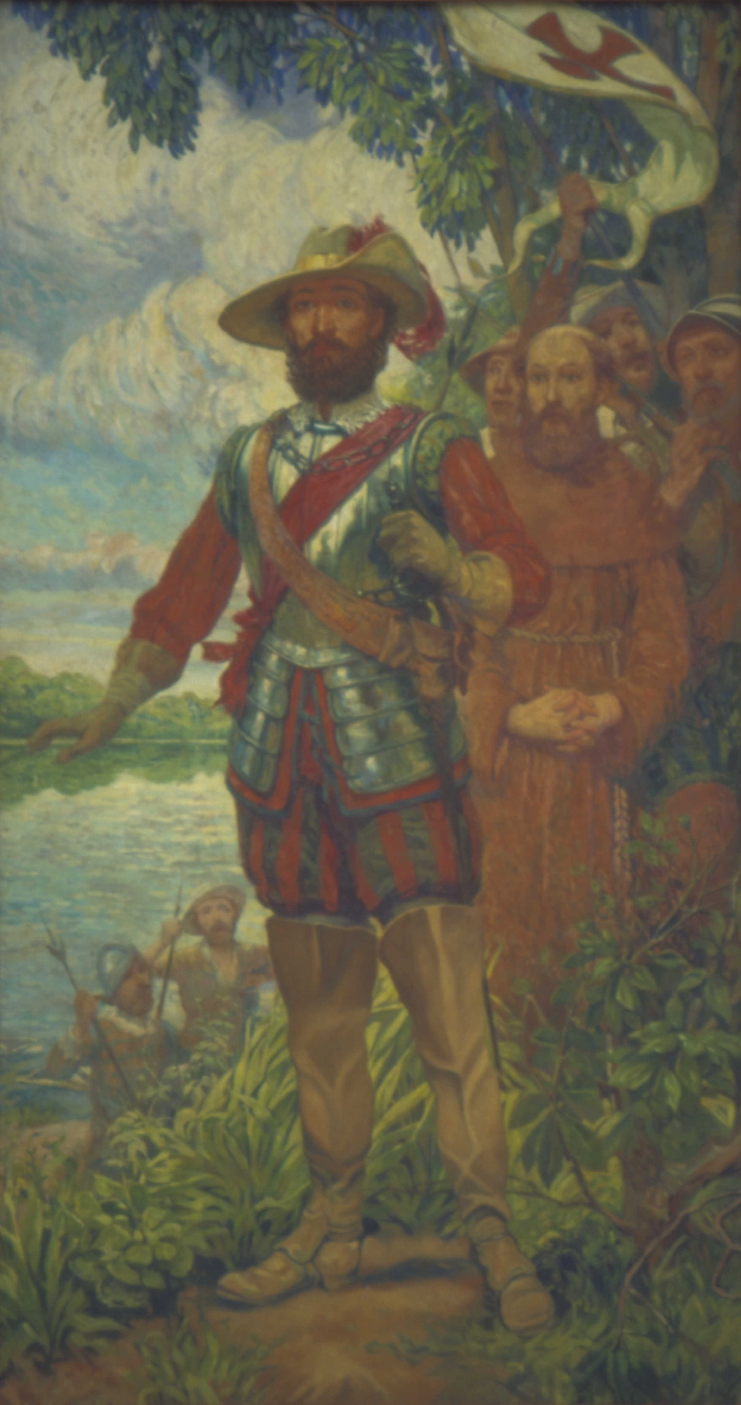 Obra que integra o acervo do Museu Paulista da USP.